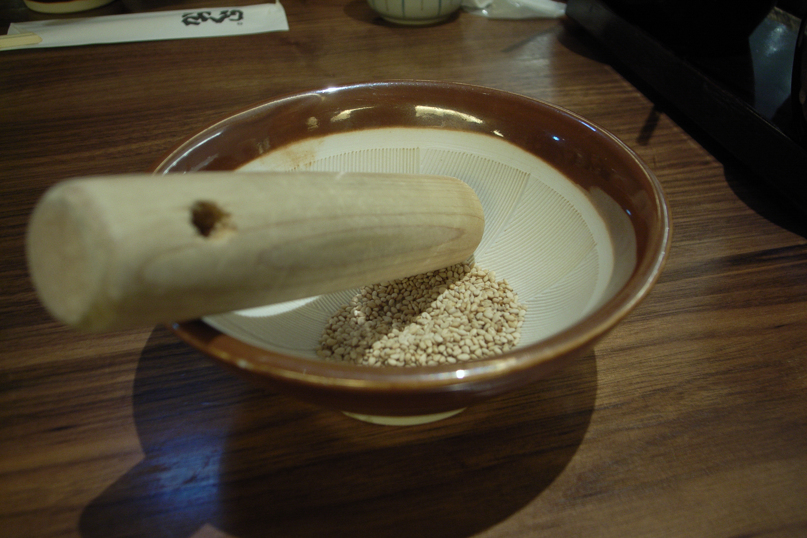 ごまをすってソースの中に入れますかつくら＠新宿